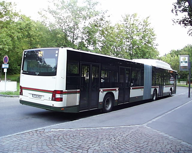 MAN NG 313 CNG Lion's City-EEV Erdgas-Bus, Lieferjahr 2006; 14 Stück (3547 - 3560). Dieses Bild entstand an der Bushaltestelle Klinikum/Bezirkskrankenhaus (BKH). Es zeigt schon die nächste Busgeneration, dieser Bauserie in Augsburg. Hier schon mit dem Zusatz "EEV".